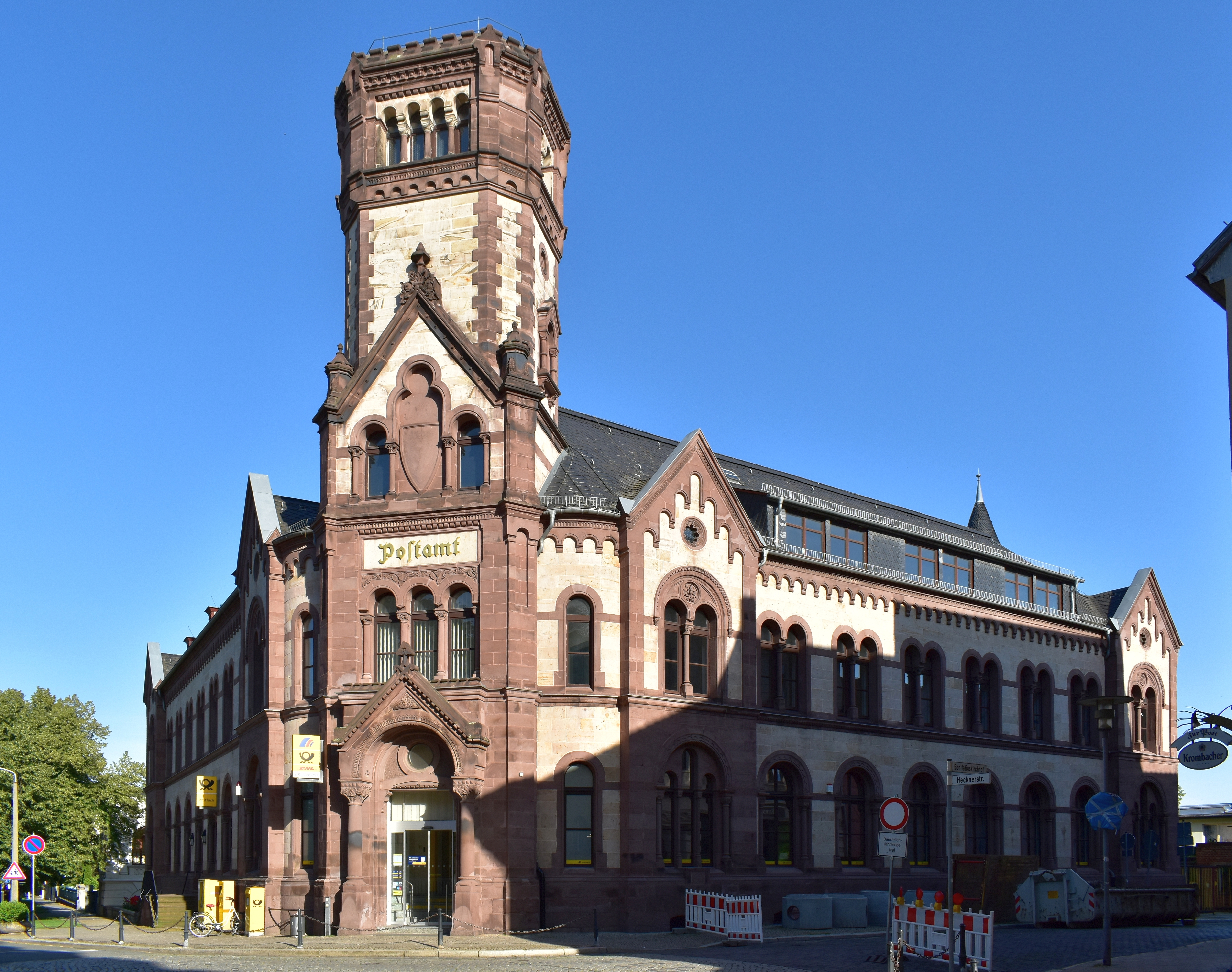 Postamt in der Bestehornstraße 1 in Aschersleben